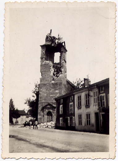 Le clocher de l’église a été détruit par les bombardements allemands lors de la prise du village, le 20 juin 1940.